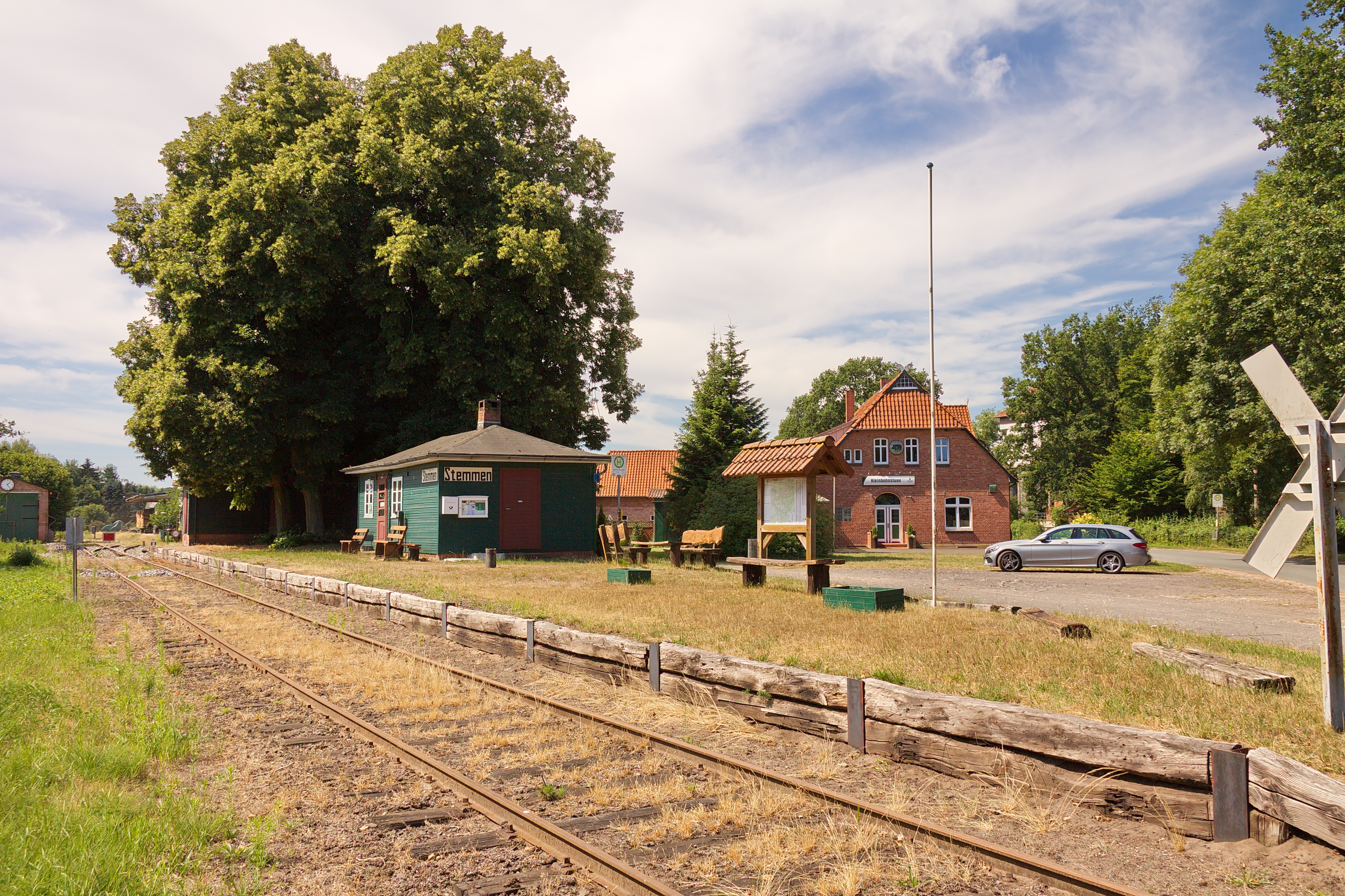 Bahnhof Stemmen in Stemmen (Kirchlinteln) Niedersachsen, Deutschland.